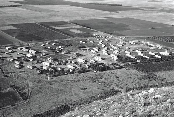 חפצי-בה - מראה כללי מהר גלבוע